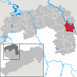 Belgern in Saxony - Landkreis Nordsachsen